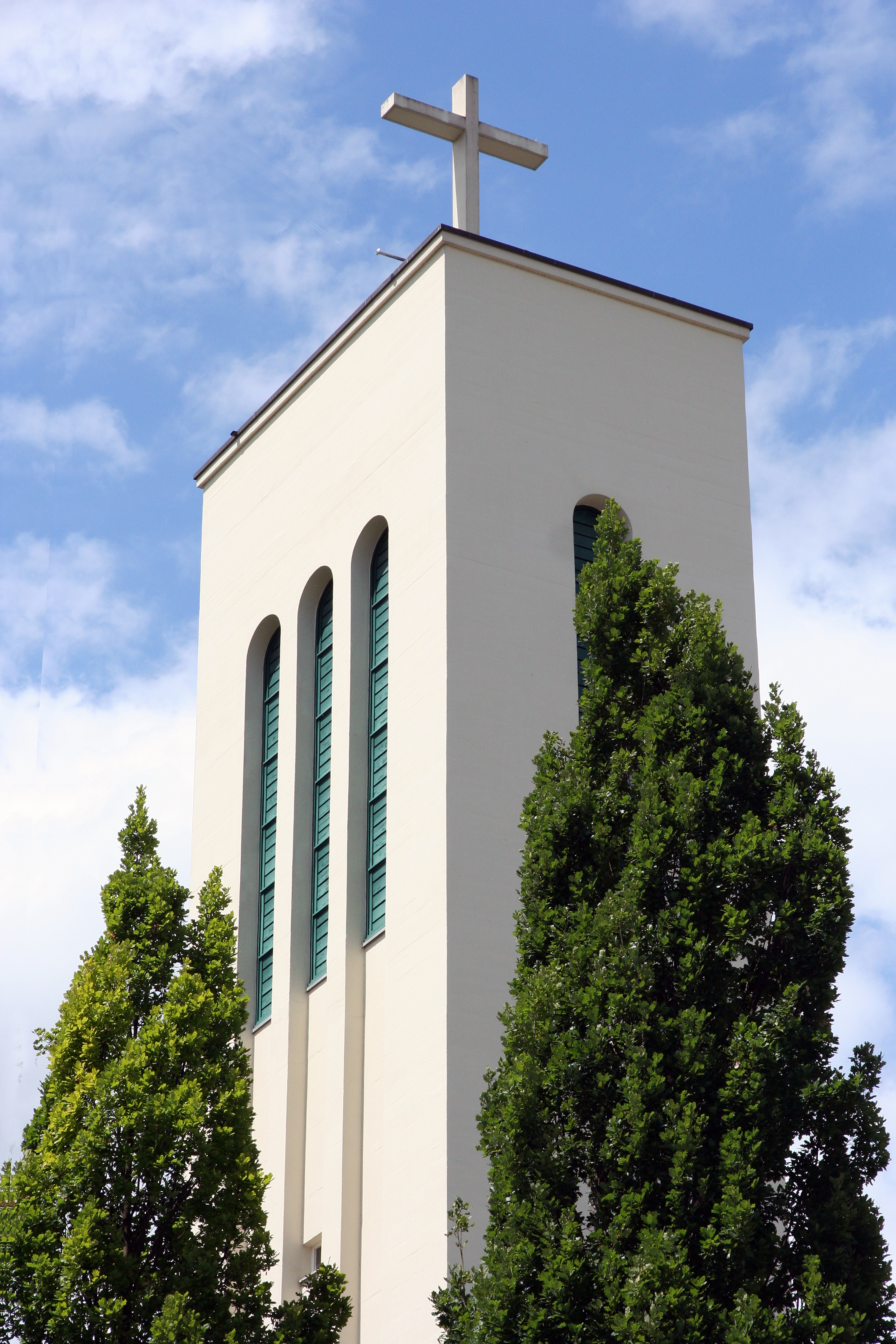 Römisch-katholische Pfarrkirche St. Josef Horgen, Glockenturm